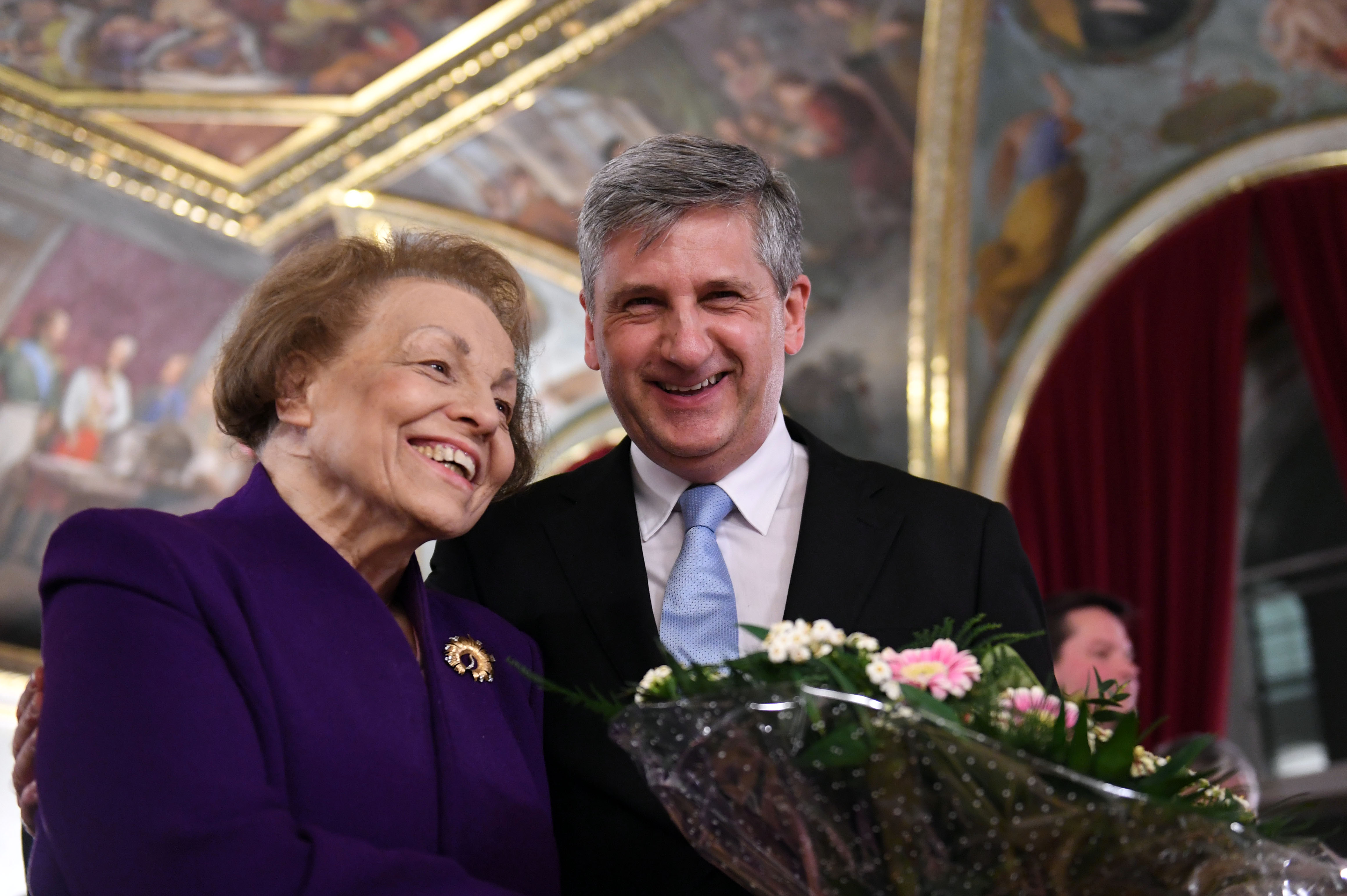 Mittwoch, den 20. Dezember 2017 überreichte Generalsekretär Linhart im Alois Mock Saal des Außenministeriums den Dr. Alois Mock-Europa-Preis. Foto: Mahmoud